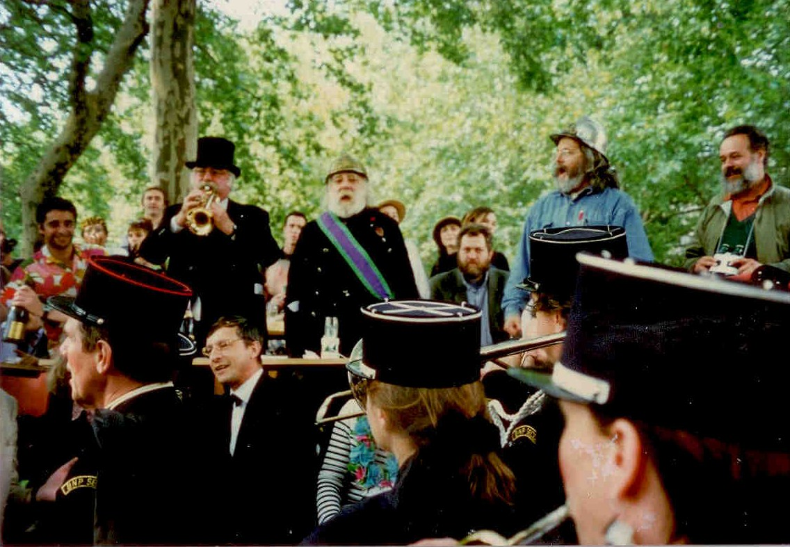 On entonne l'hymne national des Beaux-Arts : Le Pompier. Devant : les képis de la fanfare des Beaux-Arts Ted Lapeaulisse. Derrière, à la tribune du jury du concours, de gauche à droite : Poinsot, architecte et membre de la fanfare Octave Callot, à la trompette et portant un chapeau haut-de-forme, Jean-François Duffau, sculpteur, barbe blanche et casque de pompier doré, Marchand, enseignant d'architecture aux Beaux-Arts portant un casque de pompier nickelé.